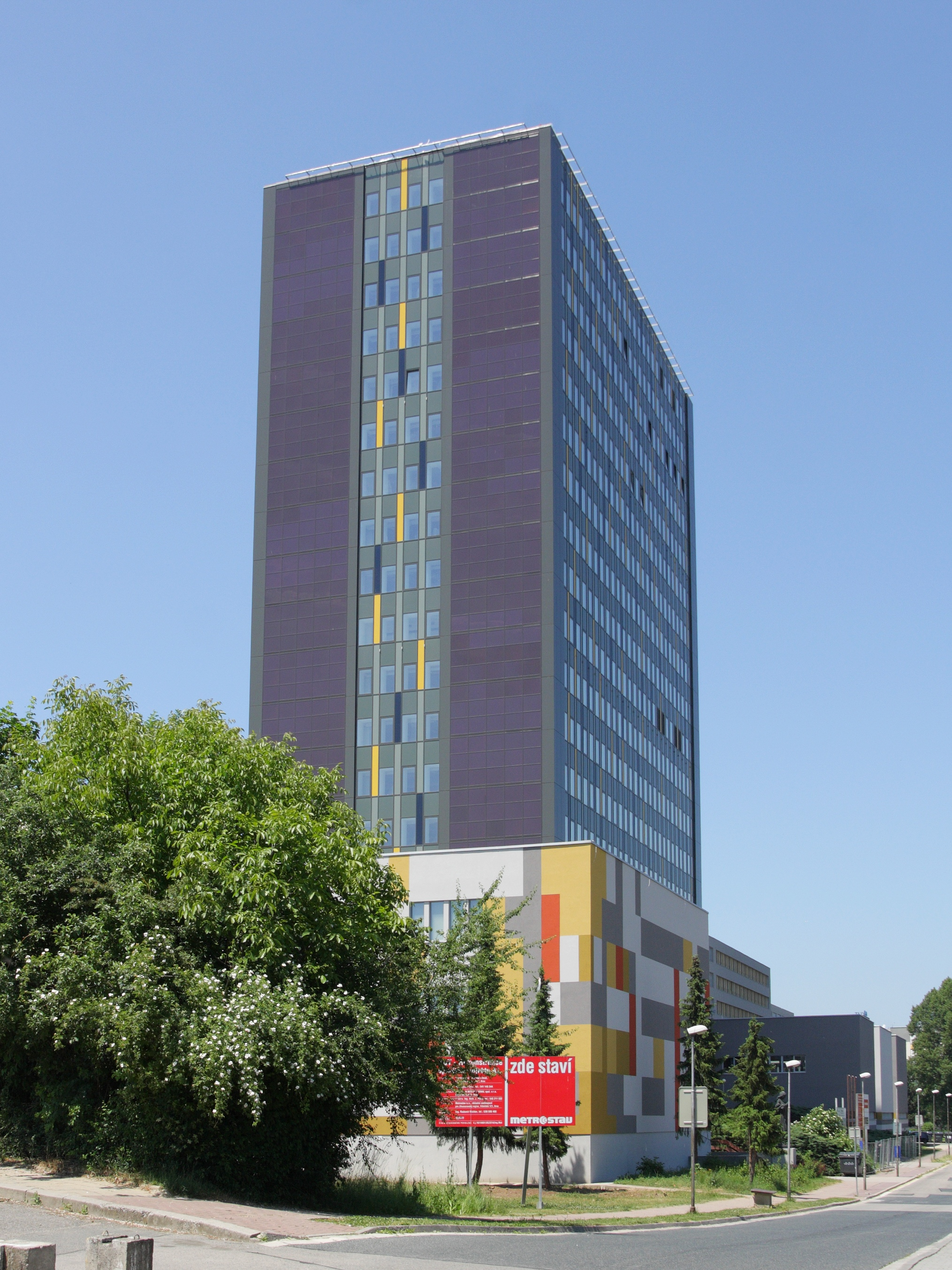 Brno - budova FSI VUT po rekonstrukci.